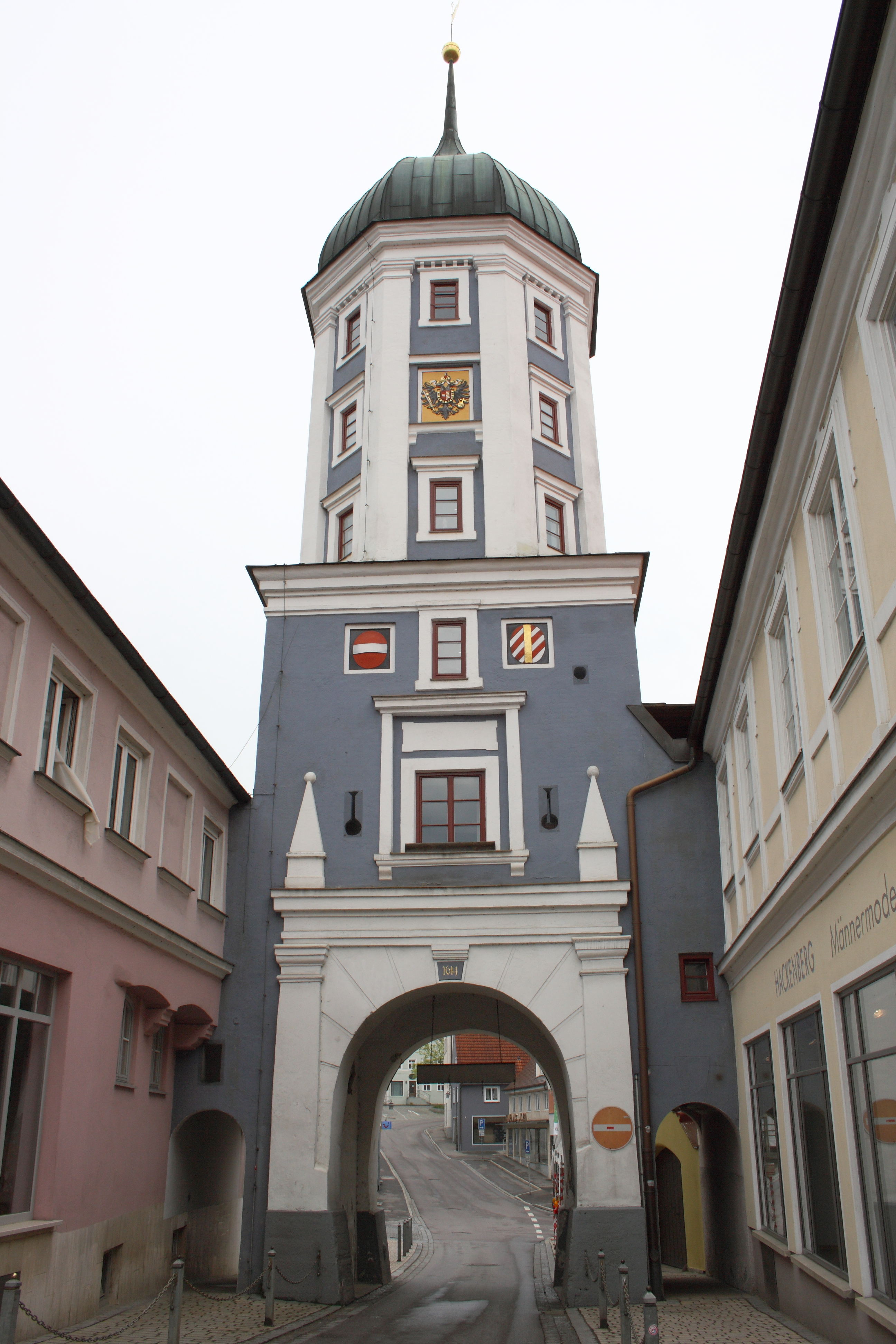 Blockhausturm in Burgau im Landkreis Günzburg (Bayern)